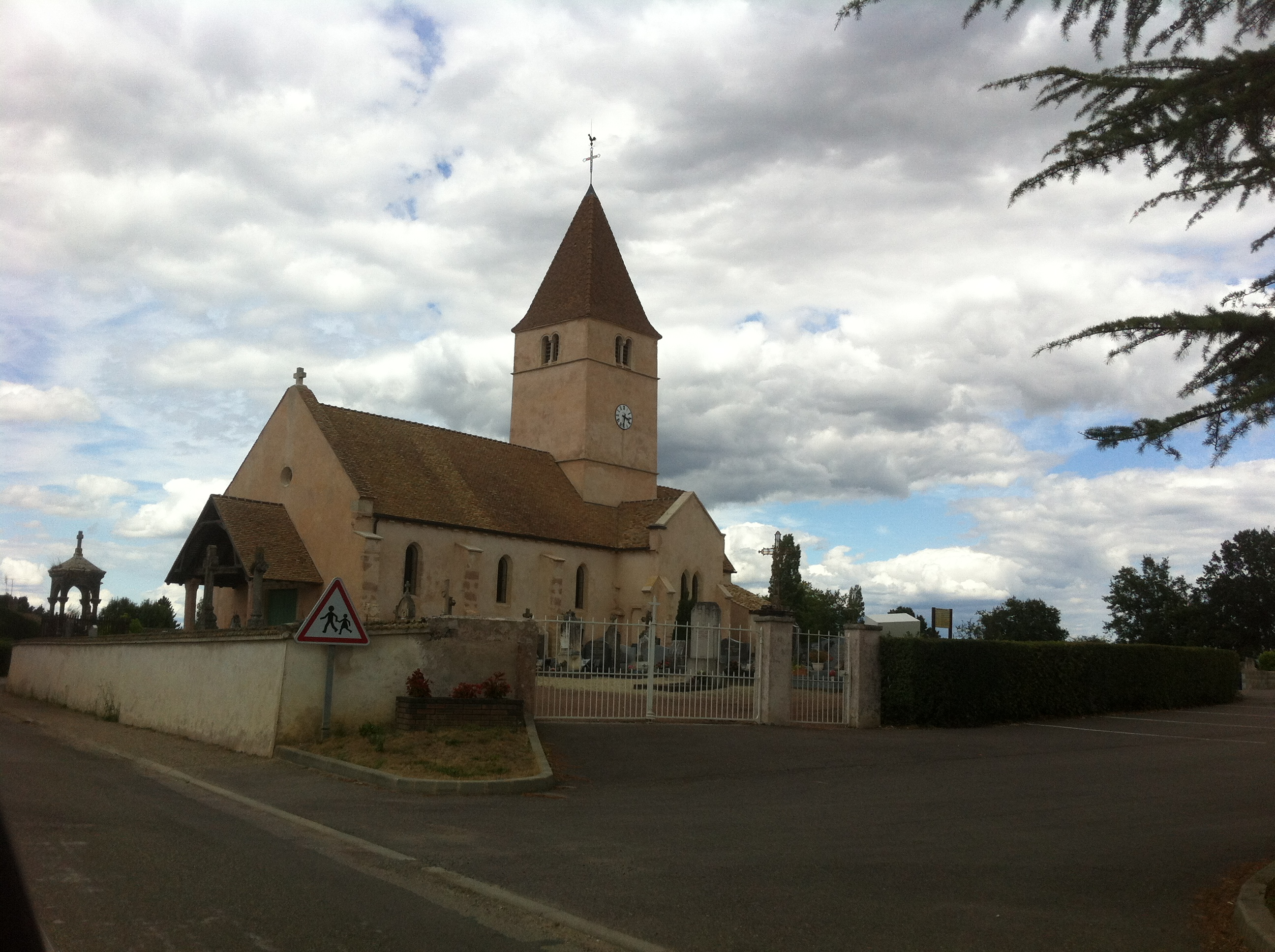 Église de la Genète (71), France